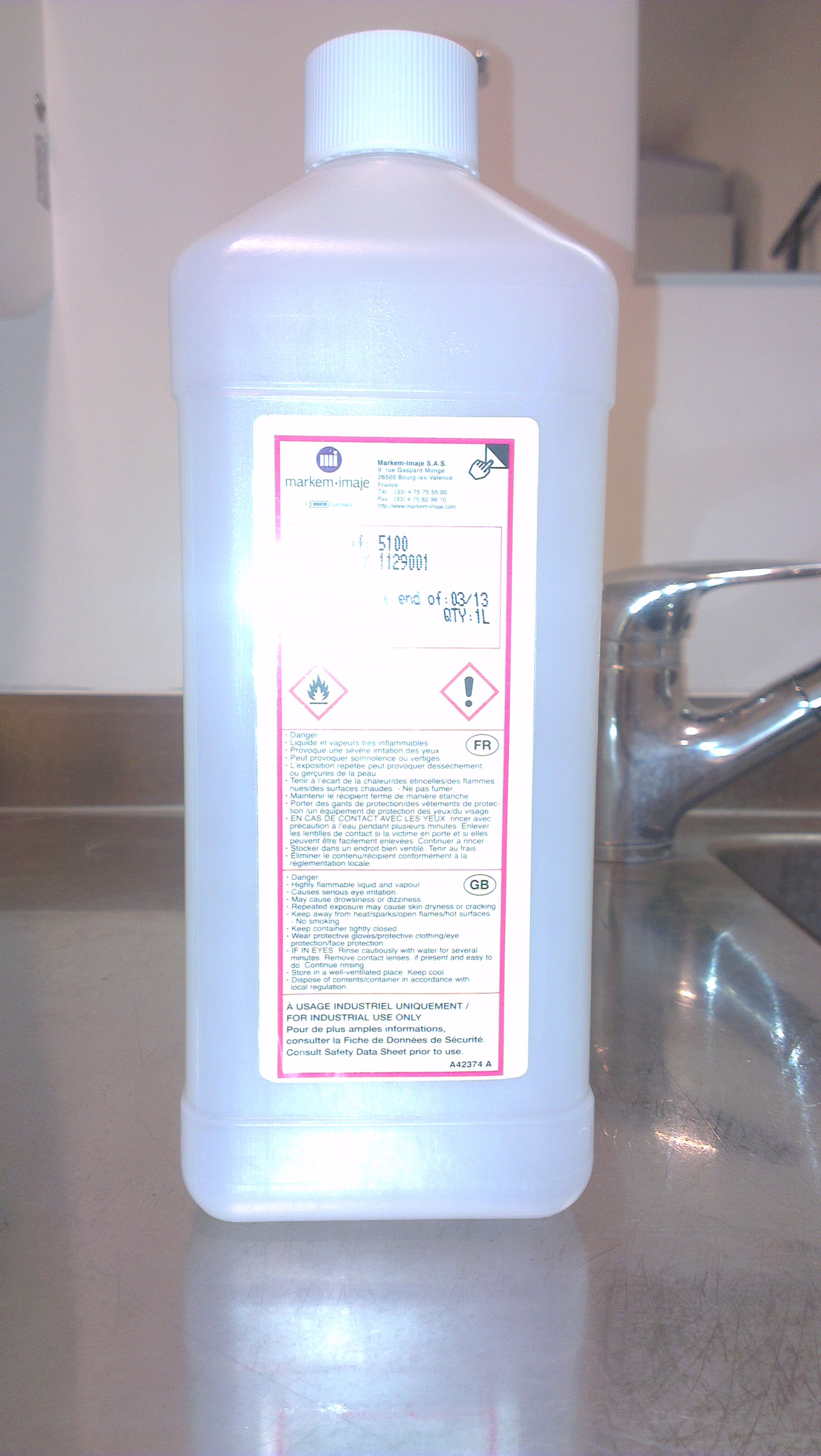 Na sliki je redčilo za kapljični tiskalnik, lastna slika